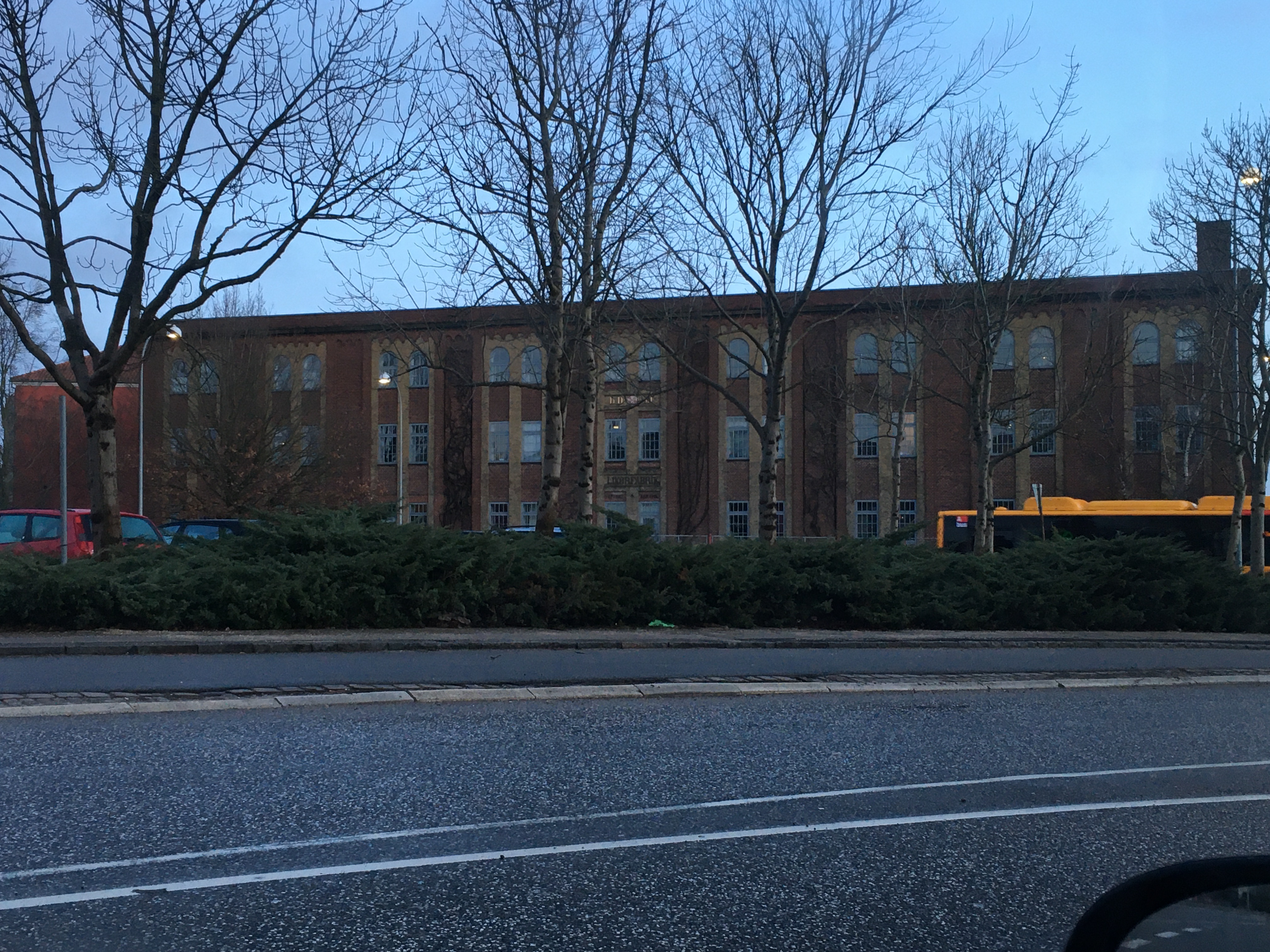 De Danske Spritfabrikker i Roskilde